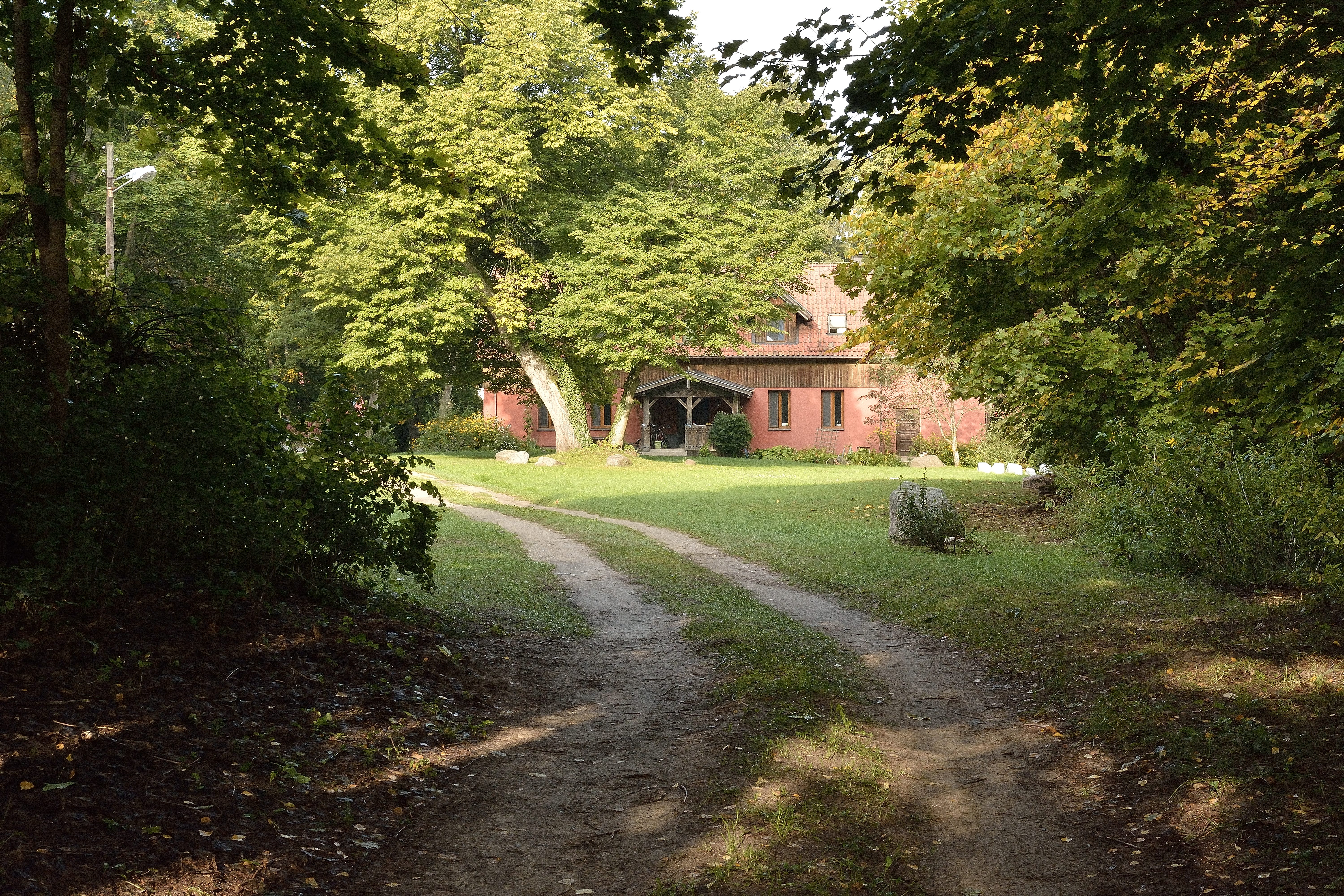 Budynek Stacji Terenowej Uniwersytetu Warszawskiego